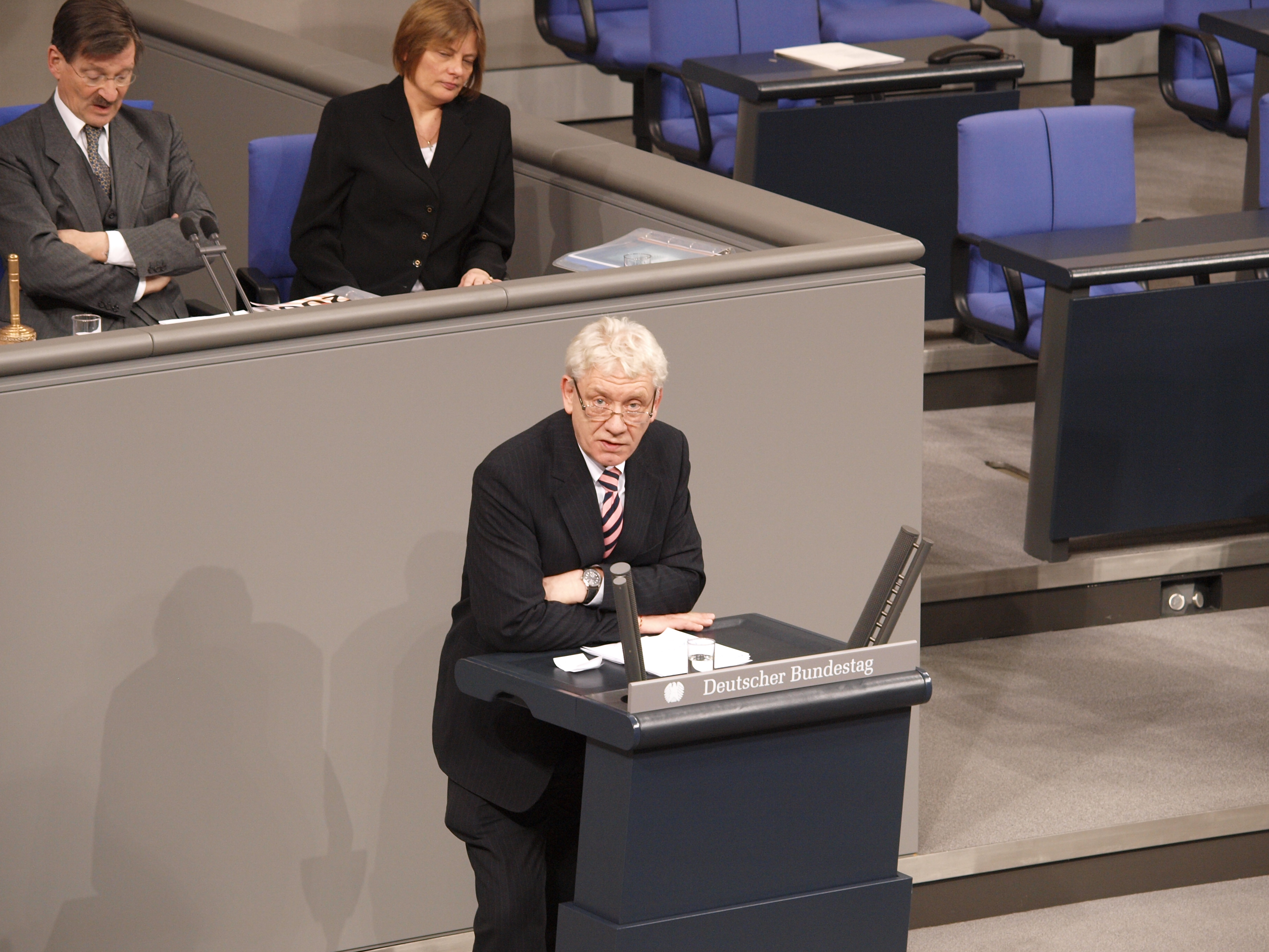 Jürgen Koppelin während einer Rede im Plenum des Deutschen Bundestages